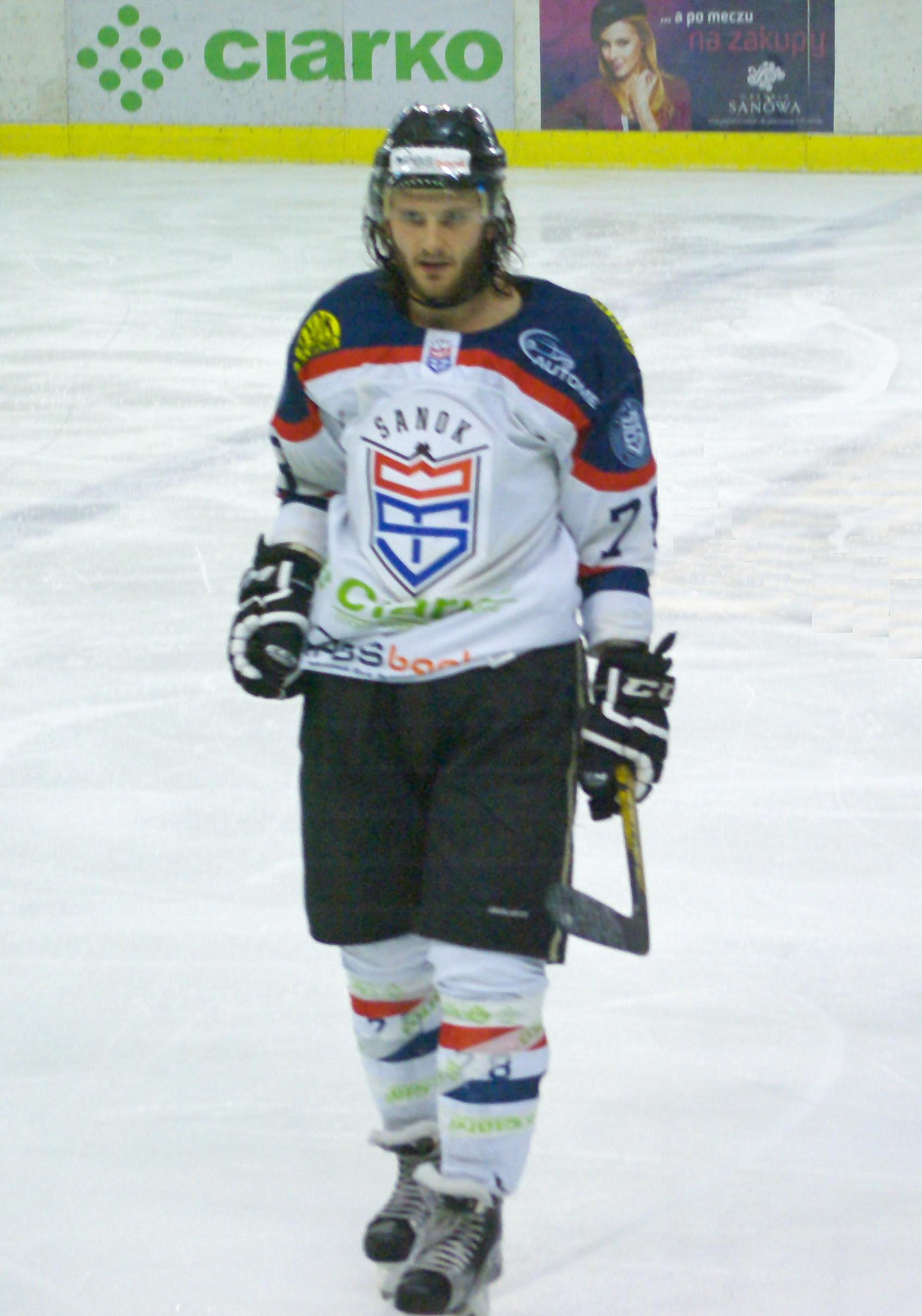 Michael Cichy w barwach STS Sanok w meczu sparingowym z Orlikiem Opole (Arena Sanok, 13 lutego 2016)